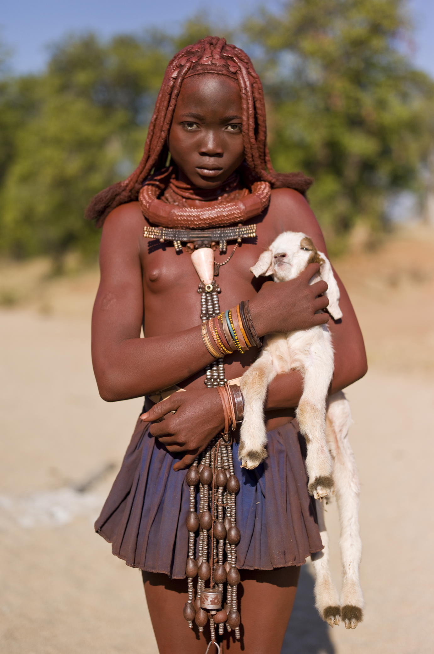 Muchimba near Elola, Moimba, Angola